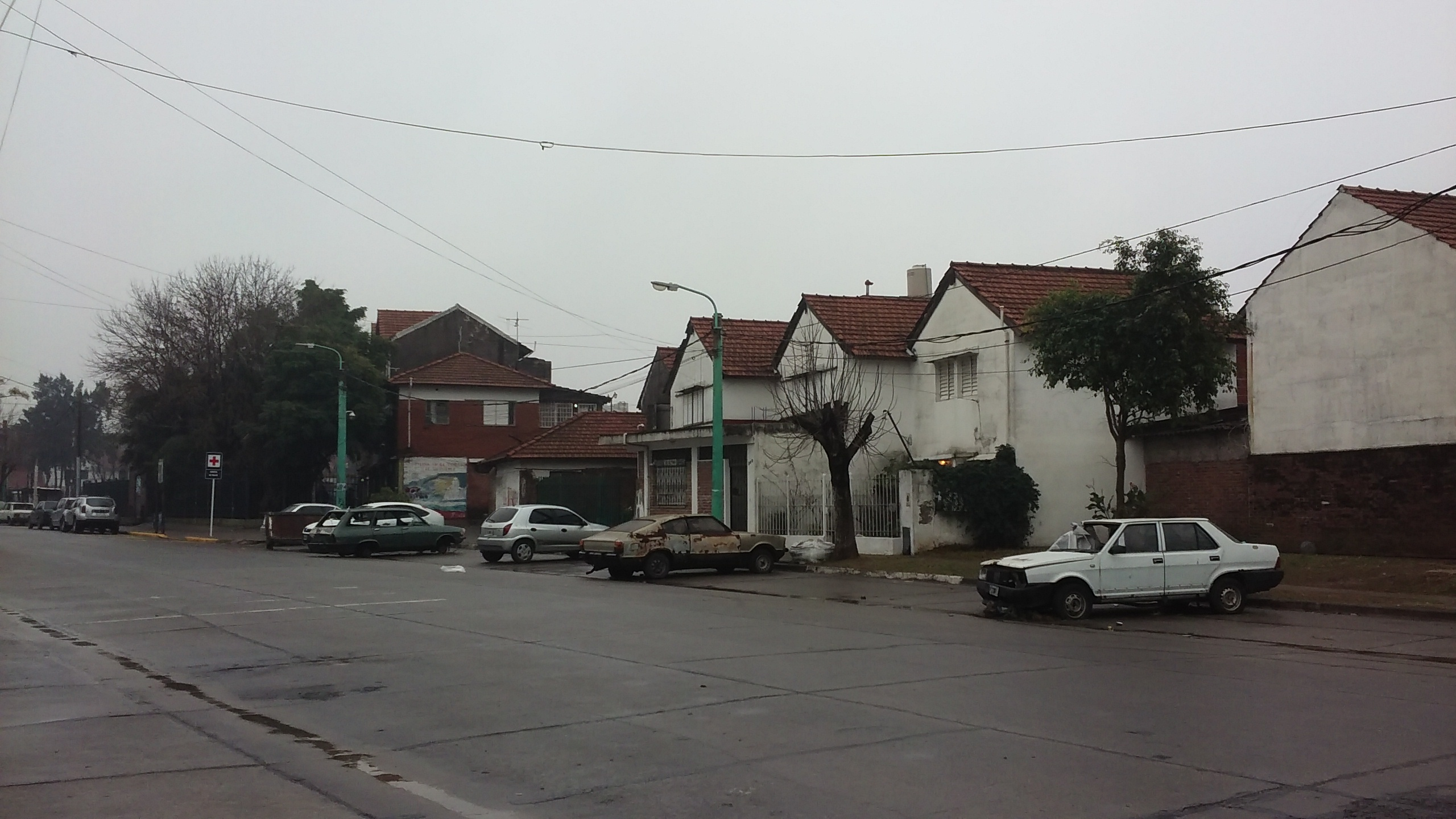 Casas del Barrio Arturo Illia en la ciudad de Buenos Aires, Argentina. Vistas desde la esquina de calle Ana María Janer y Agustín de Vedia.